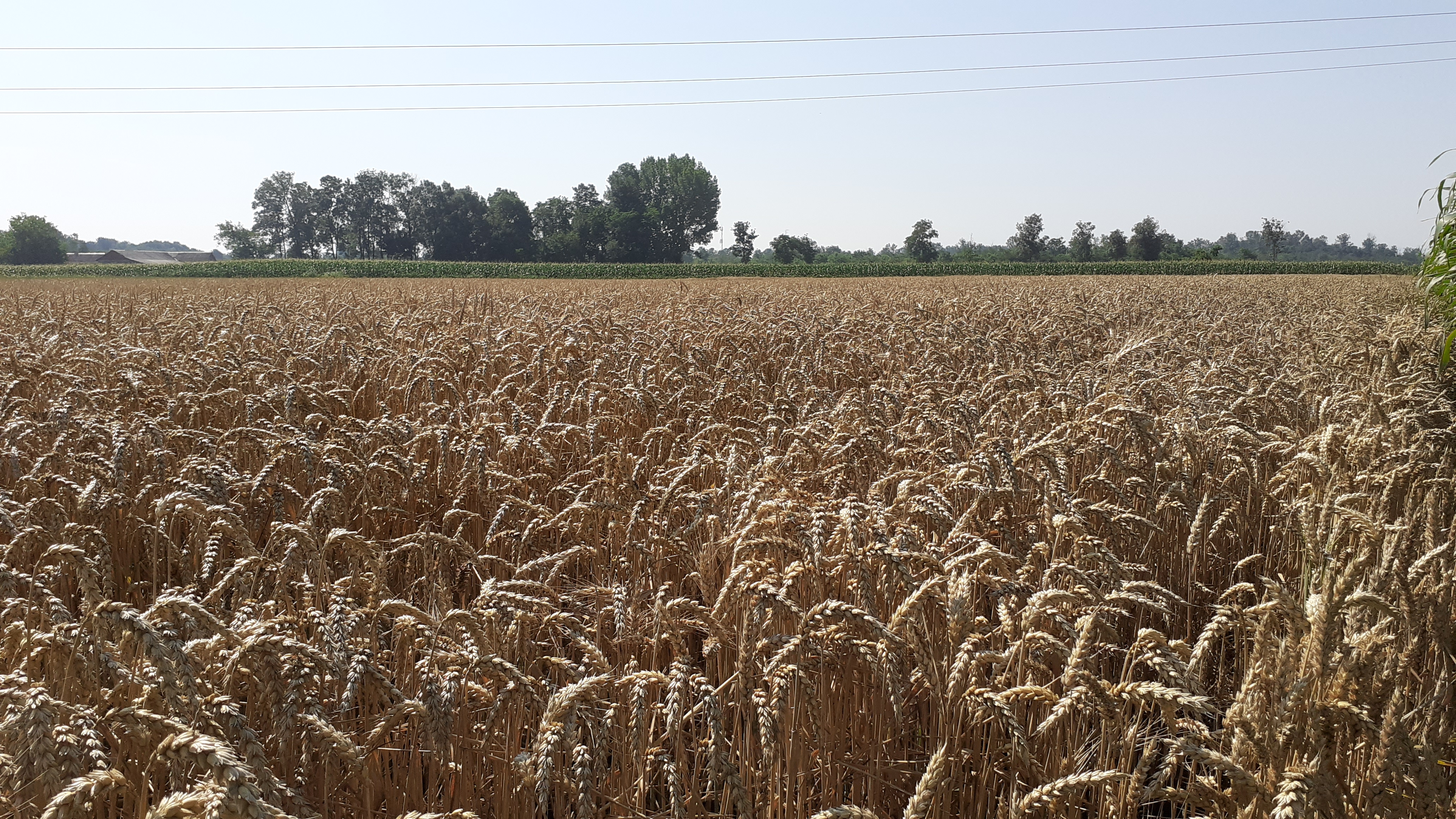 Поље пшенице у Мачви, општина Богатић, Србија